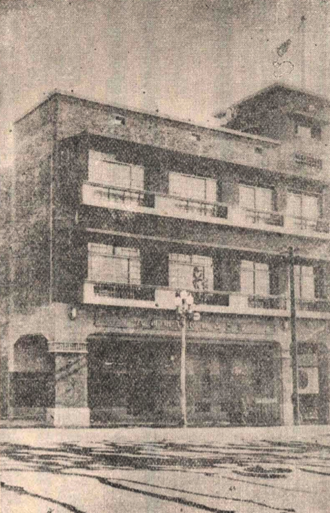 中文（台灣）: 位於台南市臺町一丁目的台南庶民信用組合，此為末廣町一丁目的新事務所